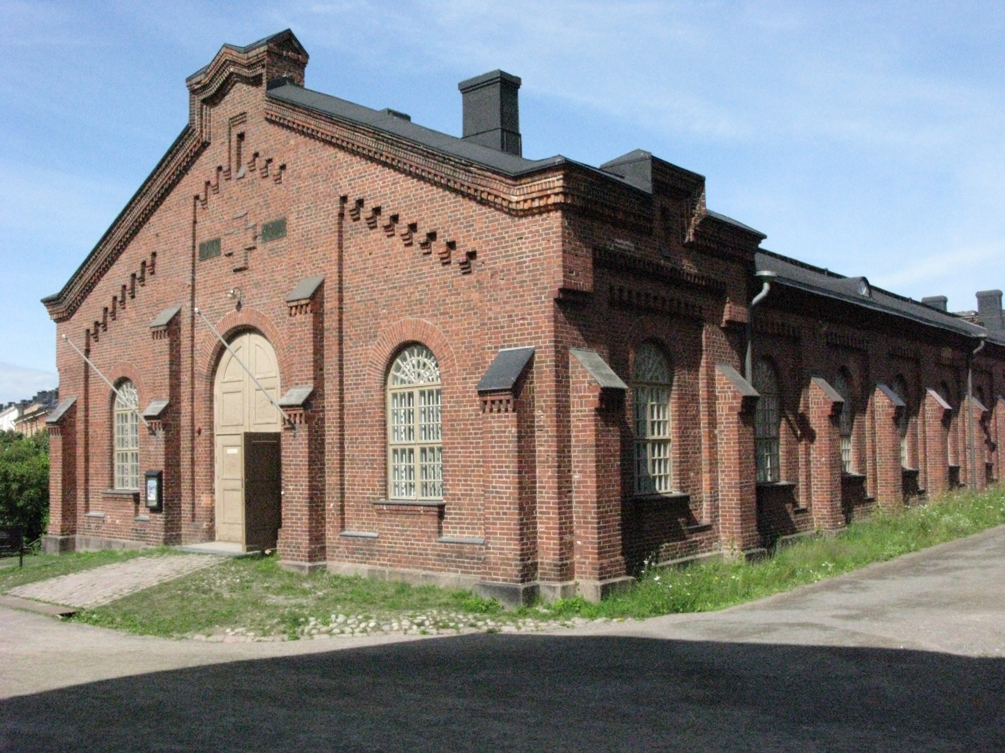 Kuva maneesin julkisivusta